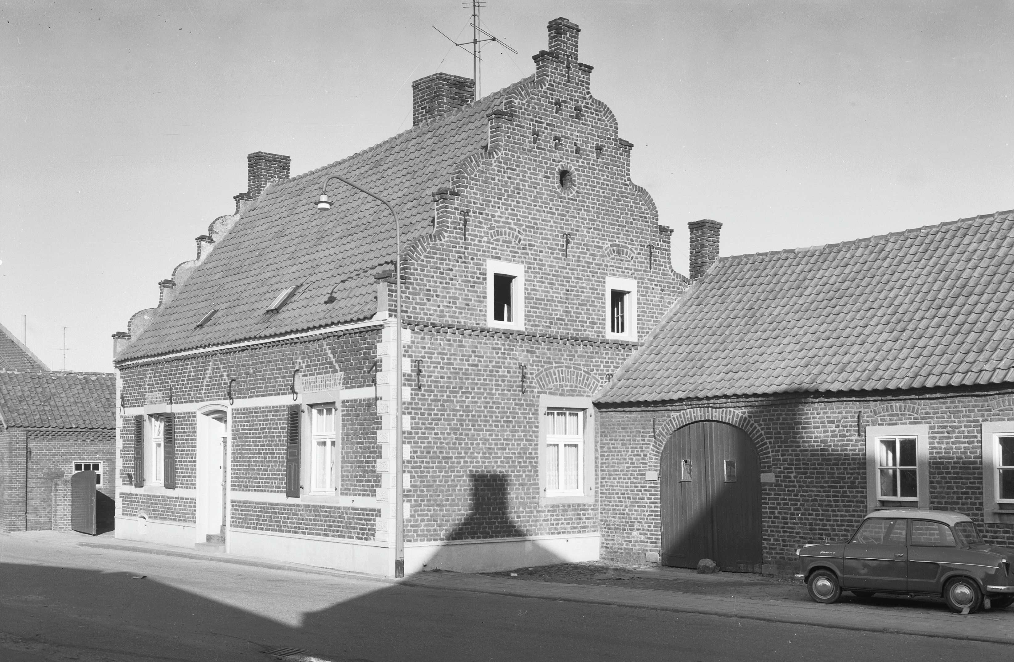 aanzicht